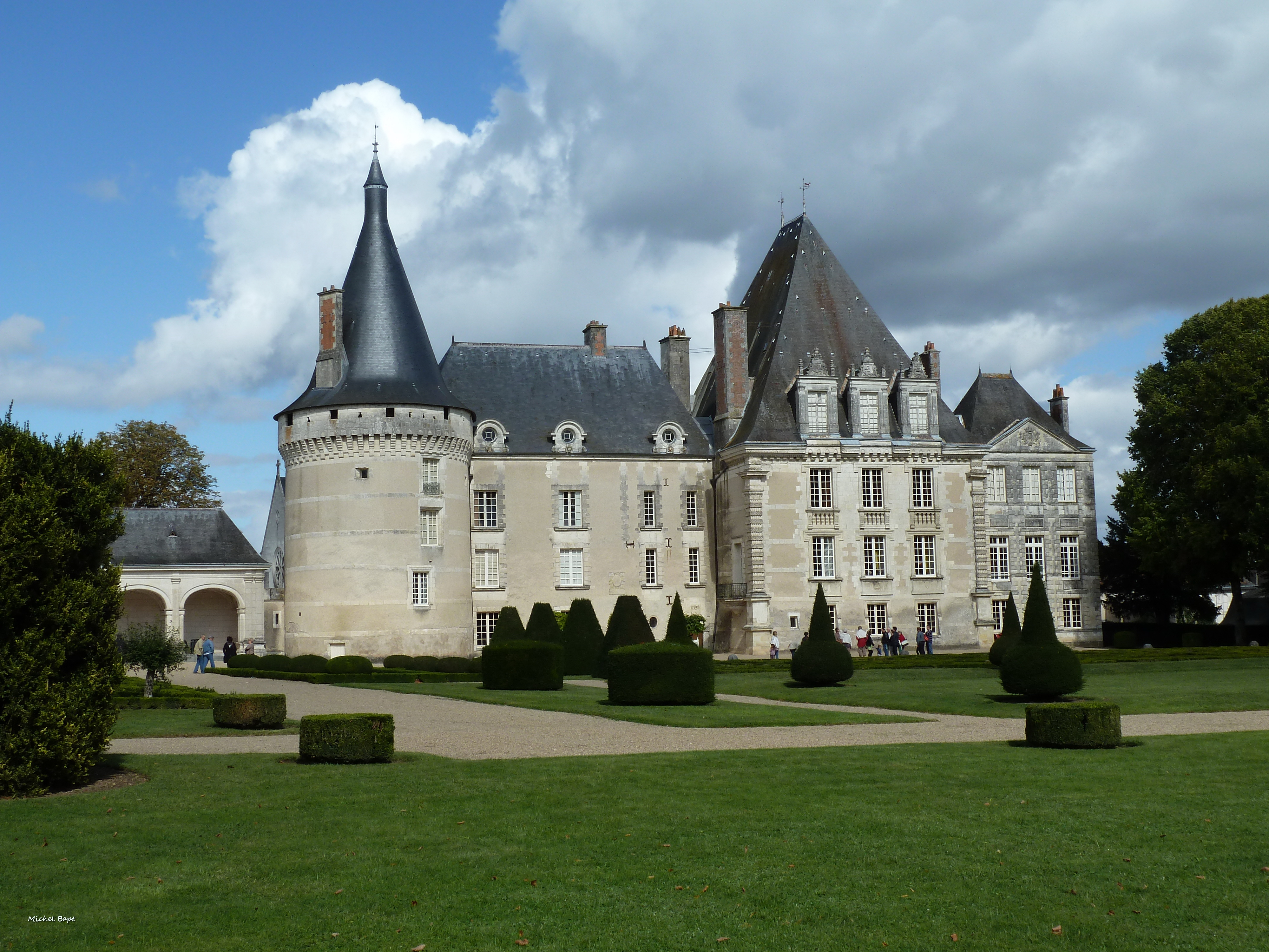 château .